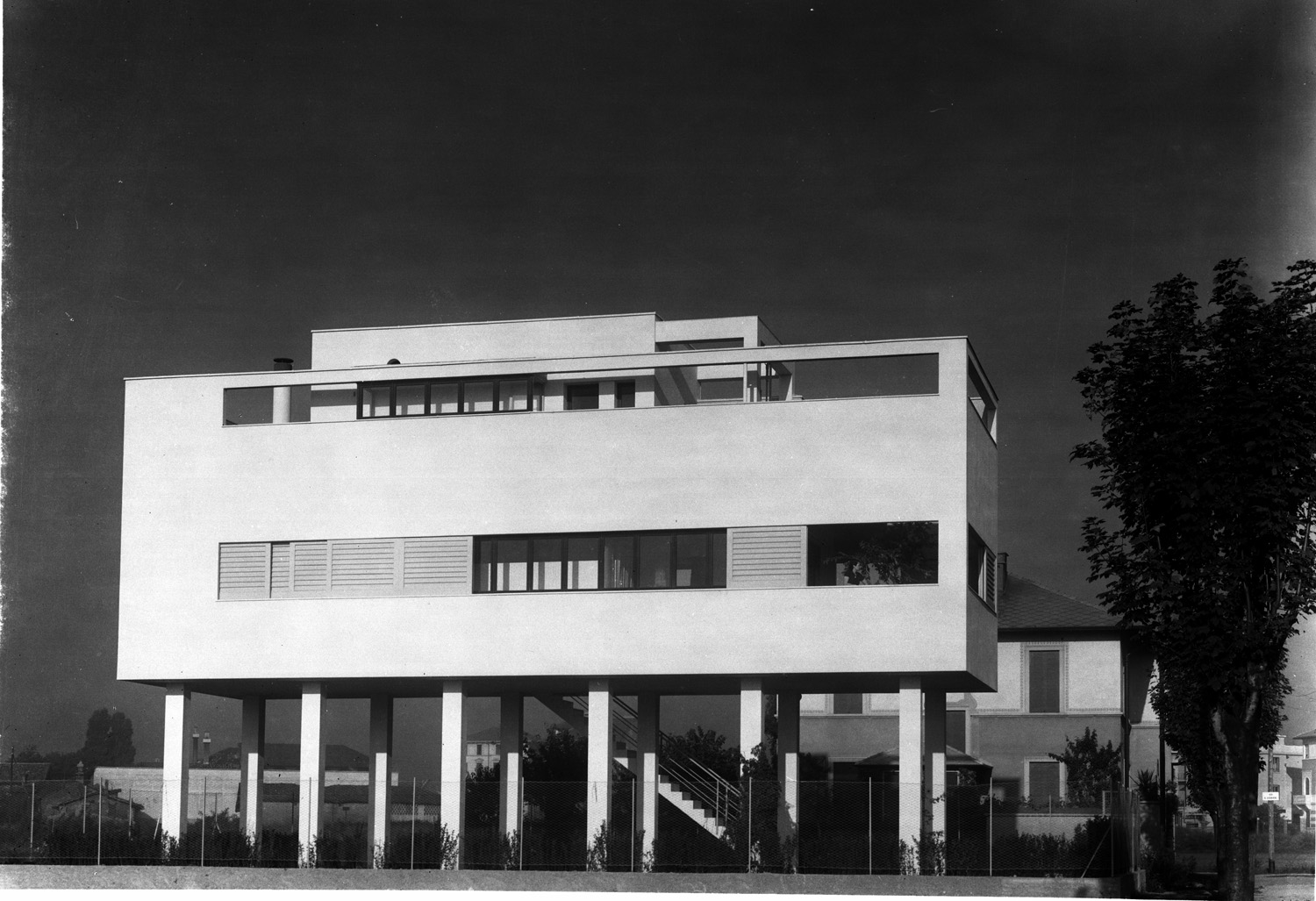 La villa Figini a Milano, costruita nel 1934-35 su progetto di Luigi Figini.